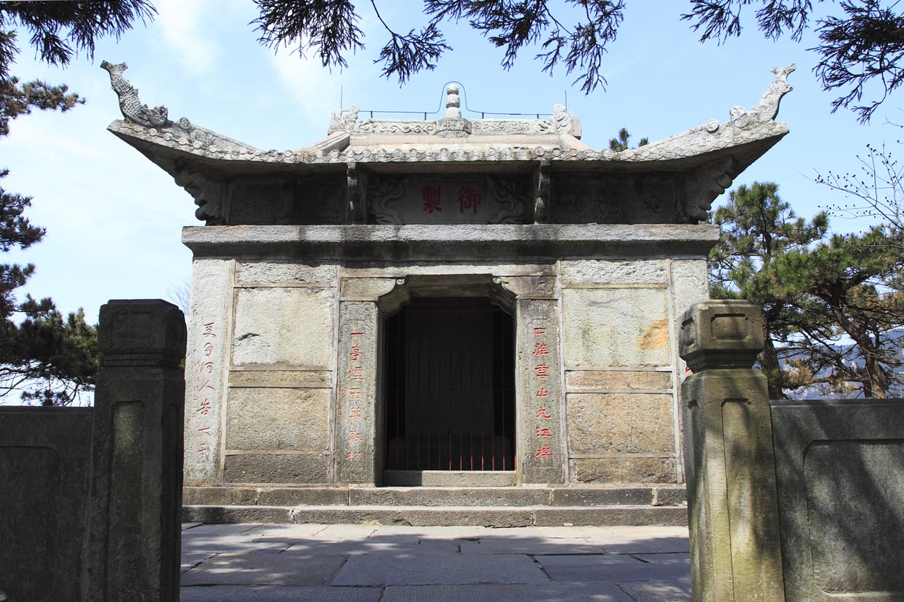 江西庐山御碑亭，江西省文物保护单位